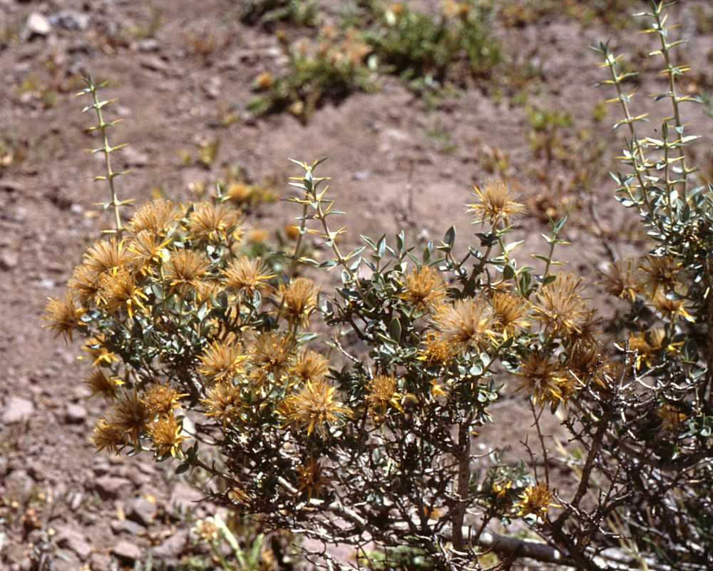 Chuquiraga oppositifolia, Korbblütler (Asteraceae) - Argentinien/Argentina, Paso de Uspallata, W Puente del Inca, ca. 2800 m s.m. (Prov. Mendoza)